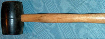 Immagine di un martello di gomma